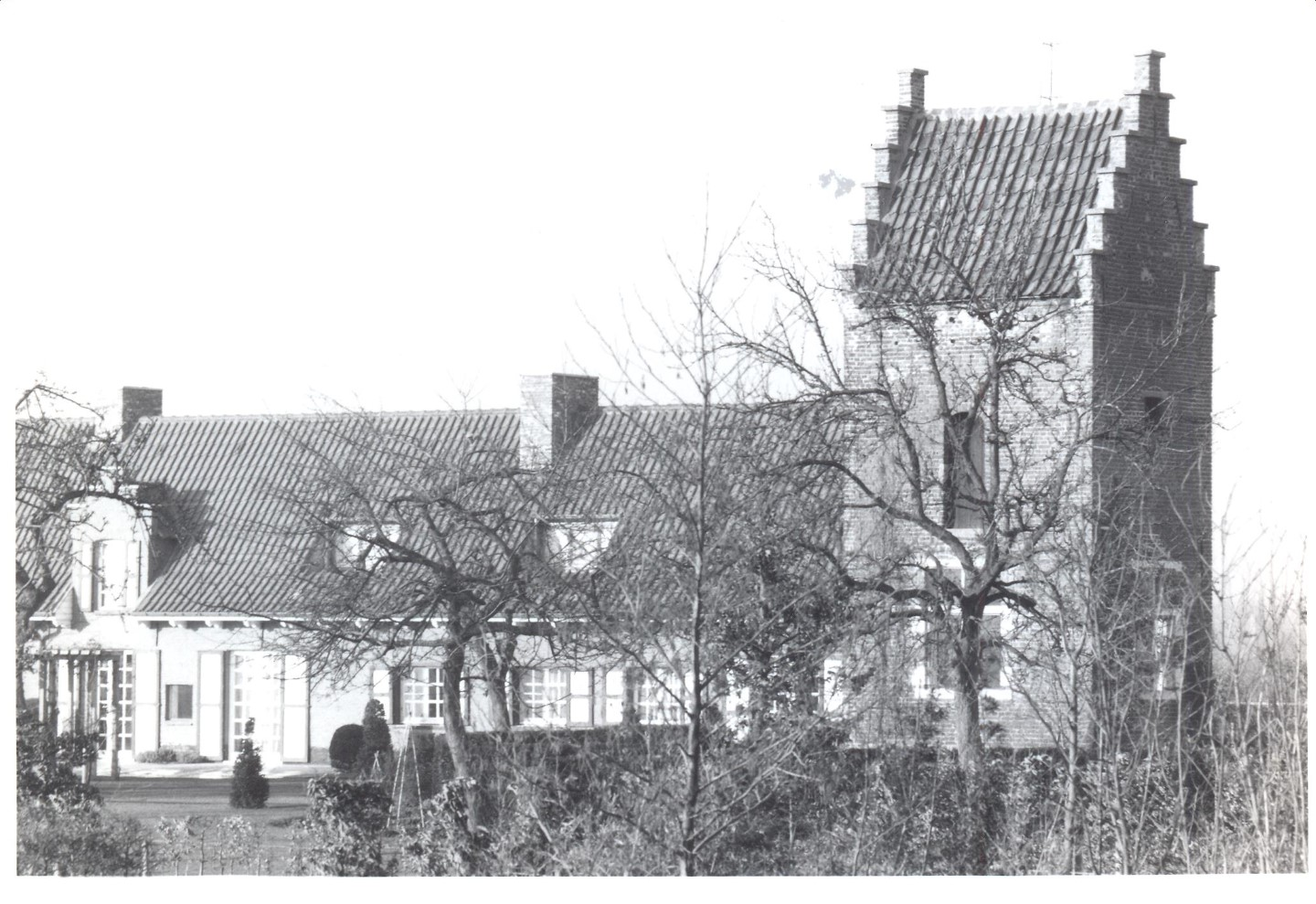 Aalter Bellem Spildoorn 4